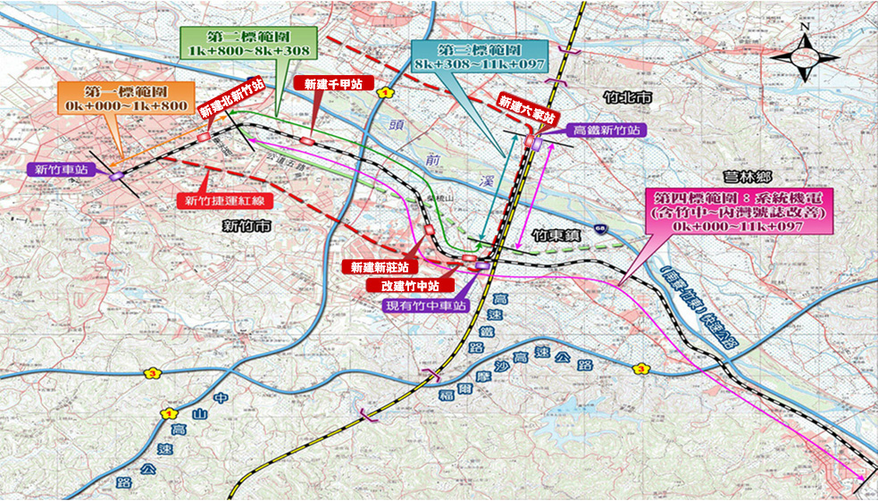 臺鐵新竹內灣支線改善計畫的計畫示意圖